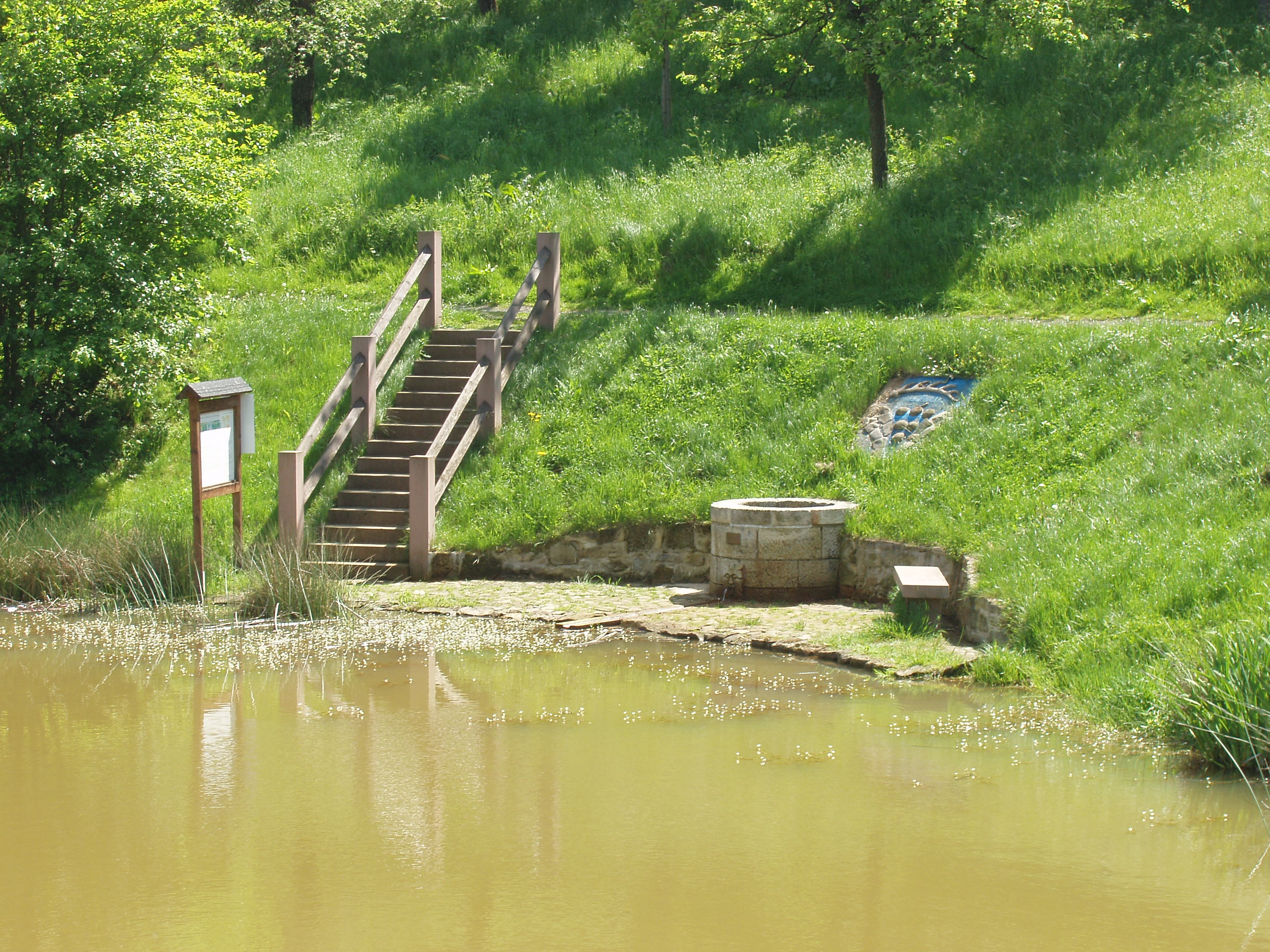 Börnecker Schwefelquelle am Nordhang des Seeberges